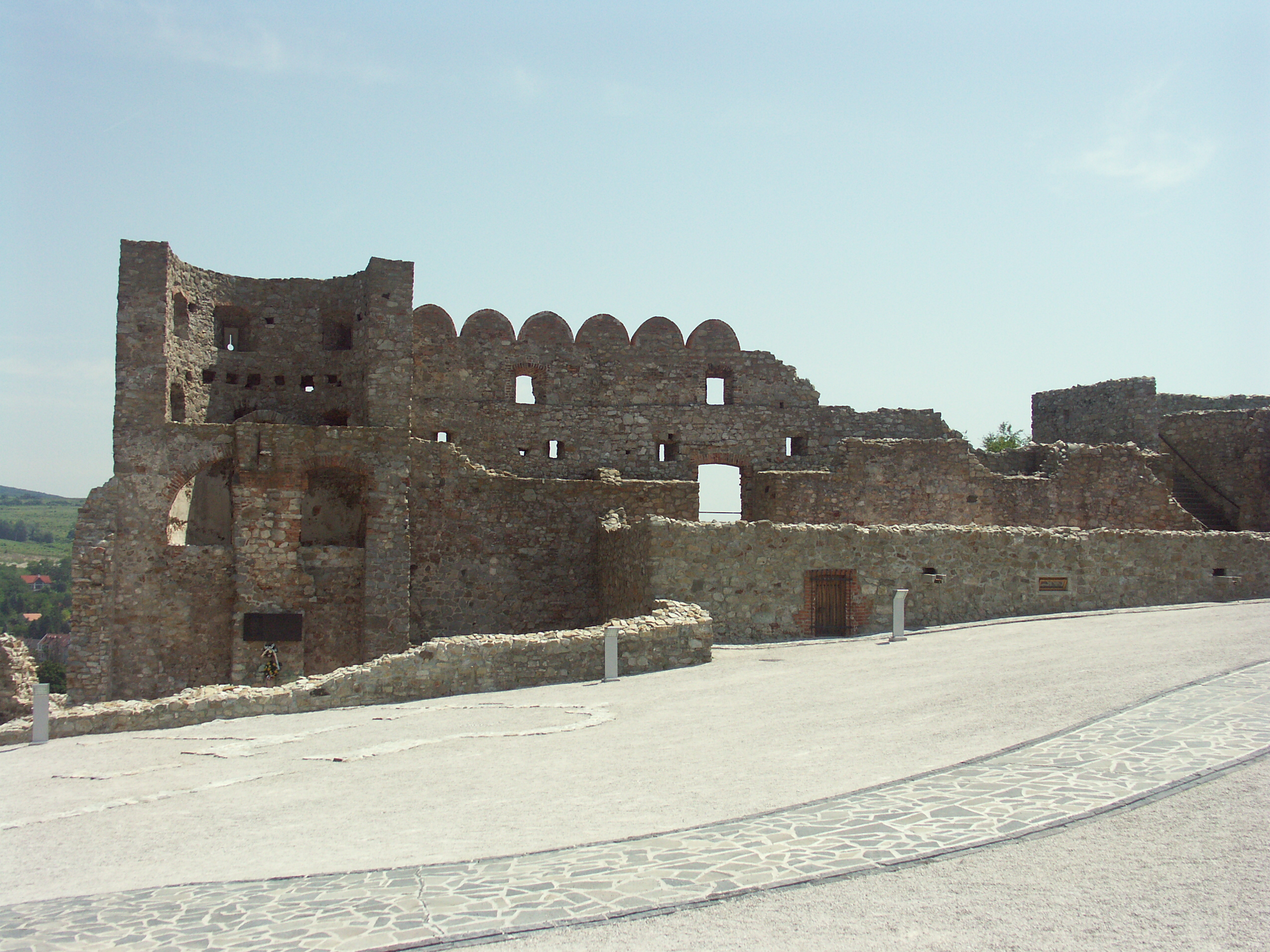 Castle Devín, Bratislava (Devín village), Slovak Republic